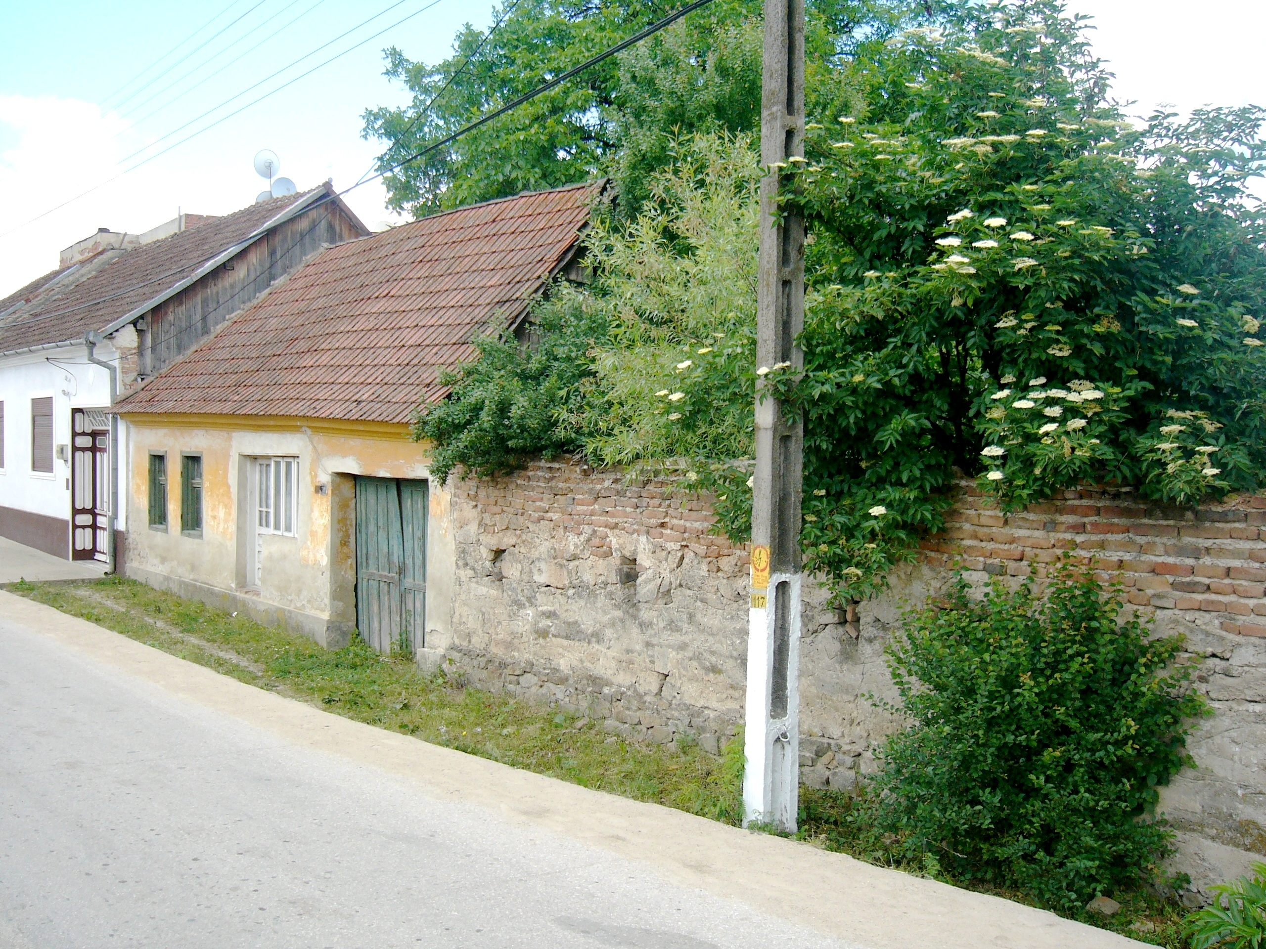 Casa din Sichevita, Caras in care a locuit Ion Pena intre 1936-1941